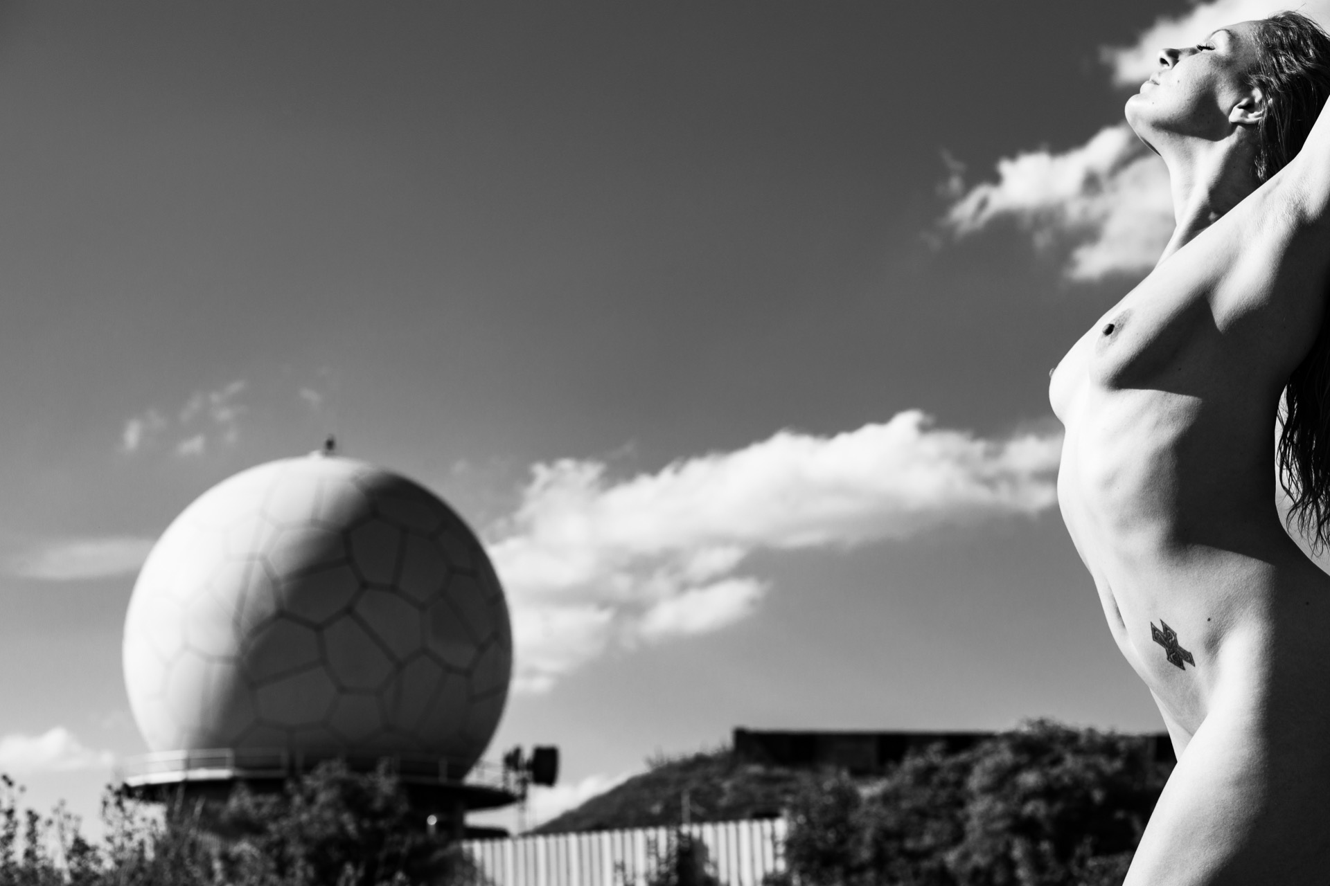 série aktových fotografií nedaleko vojenského radaru